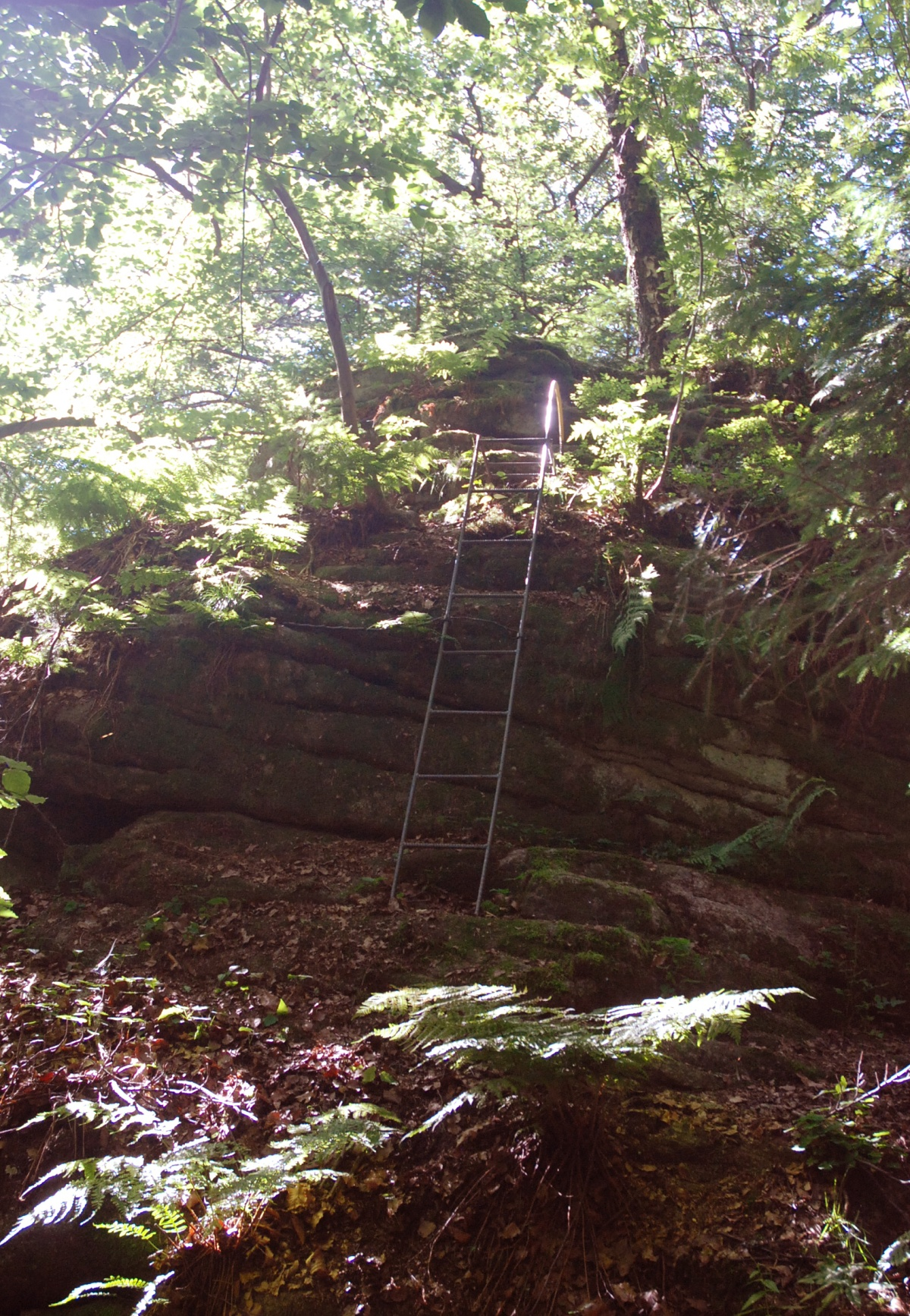 Šelmberk